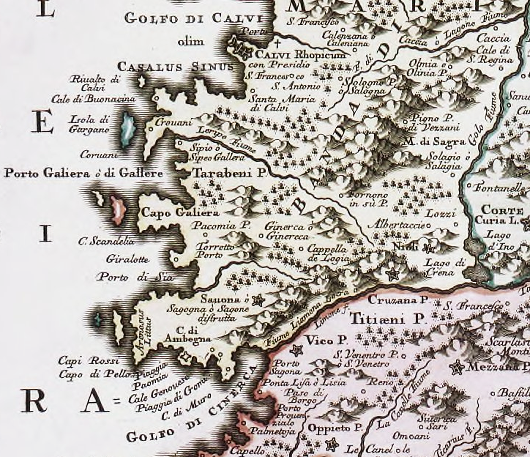 Extrait « Deux-Sevi » de la carte de Corse Insula Corsica olim regni Tiulo insignis, nunc Genuensis reipublicae potestati subjecta de Matthaeum Seutter, édition : 1700-1799